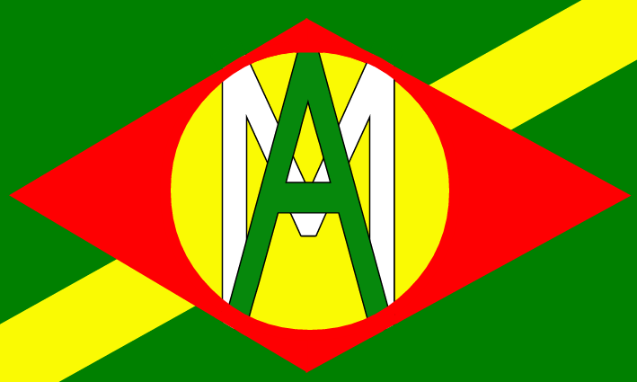 Bandeira do município de Amapá do Maranhão, estado do Maranhão, Brasil.